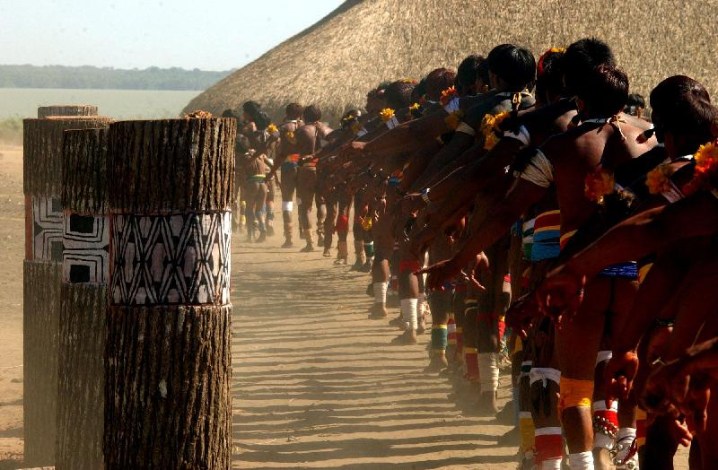 Alto Xingu(MT) - Dança em frente ao tronco. Festa do Kuarup, na aldeia Kamayurá